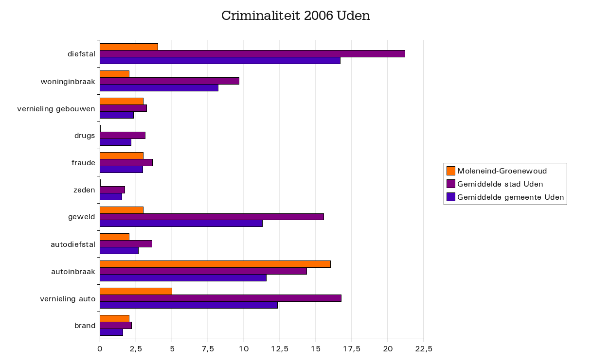 Criminaliteitcijfers in Uden Moleneind-Groenewoud (2006), Noord-Brabant, The Netherlands